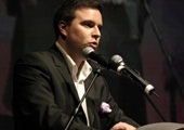 Edouard Fillias discours